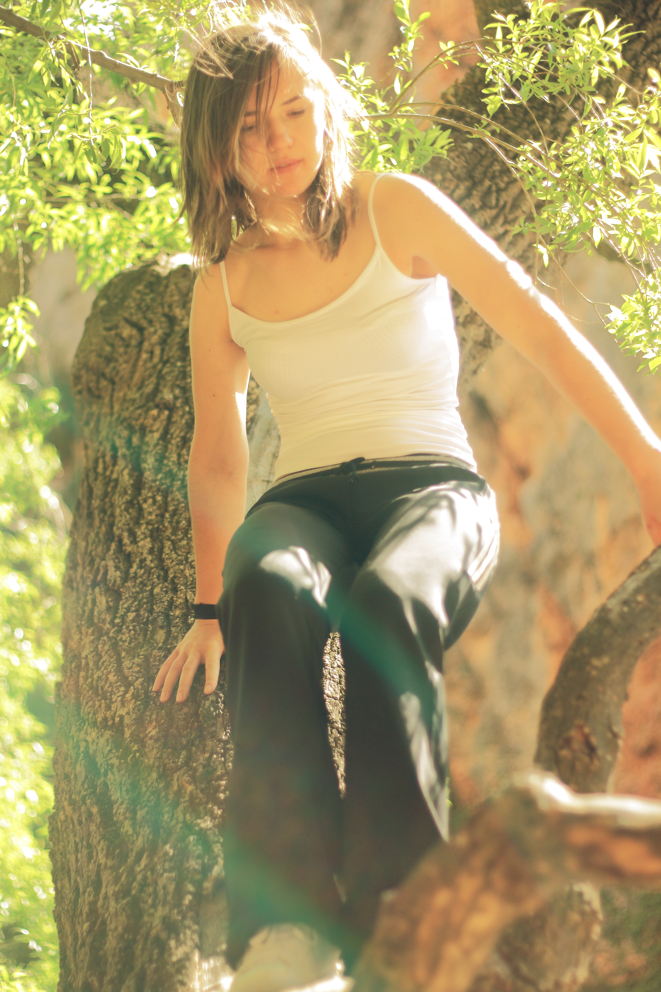 Monasterio de Piedra, España